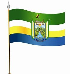 Bandera de la parroquia Misahuallí